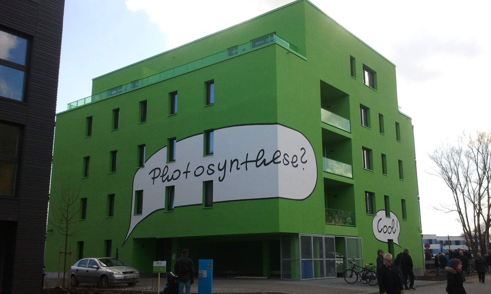 Das Algenhaus ist ein Demonstrationsprojekt der IBA in Hamburg und besitzt weltweit erstmals eine Fassade mit integrierten Photobioreaktoren.